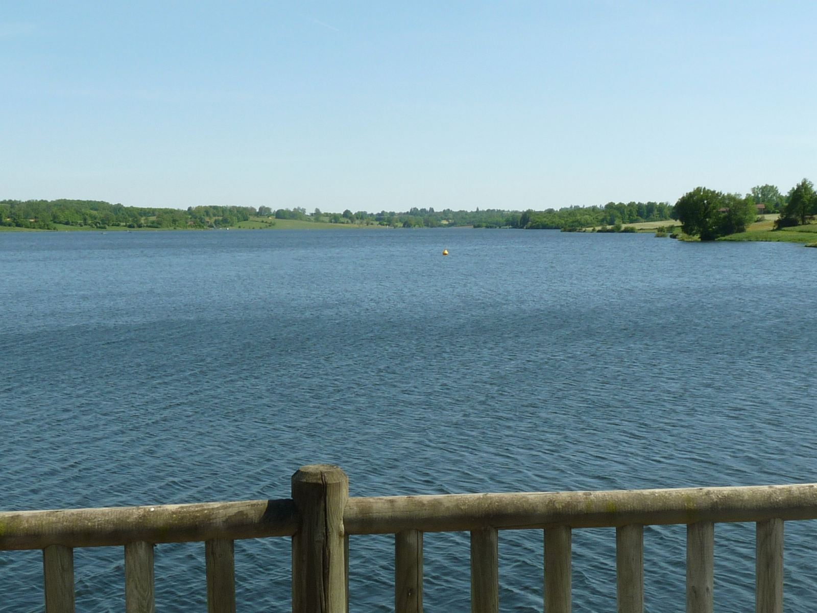 lac du Mas Chaban à Lésignac-Durand, Charente, France; vue depuis le barrage